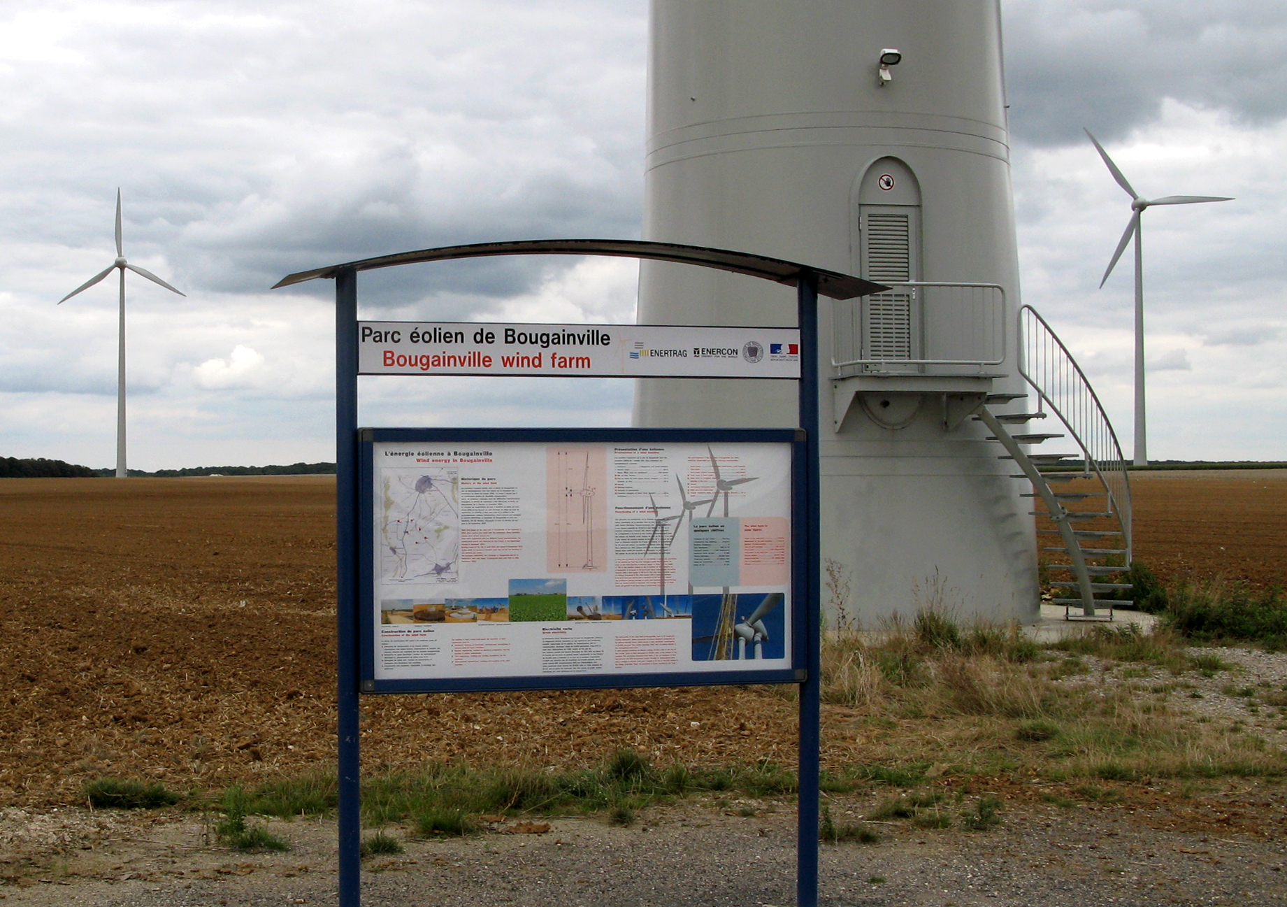 Bougainville (Somme, France) - Les éoliennes. .